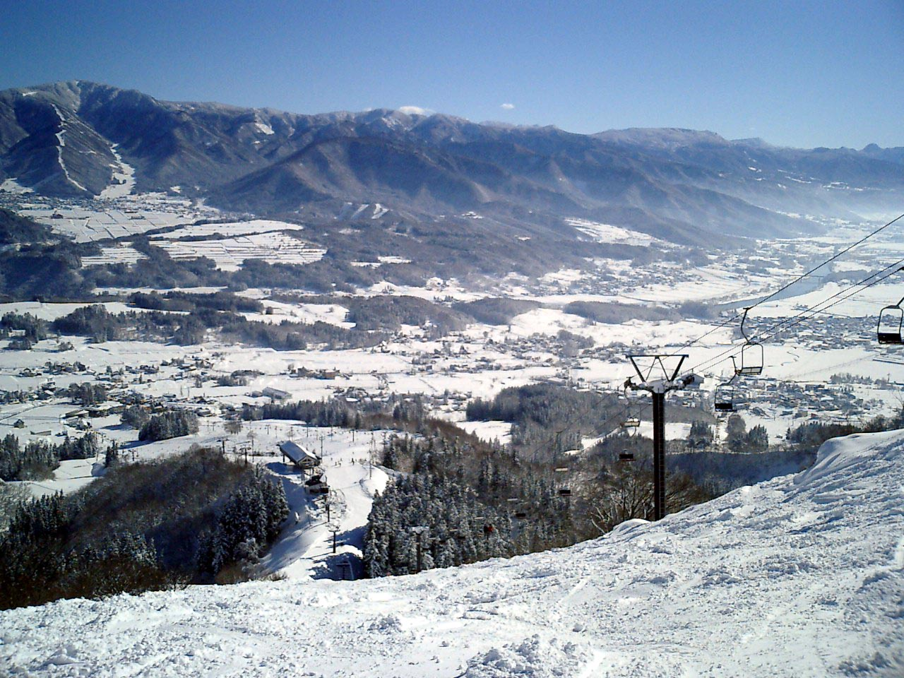 戸狩温泉スキー場、長野県飯山市。